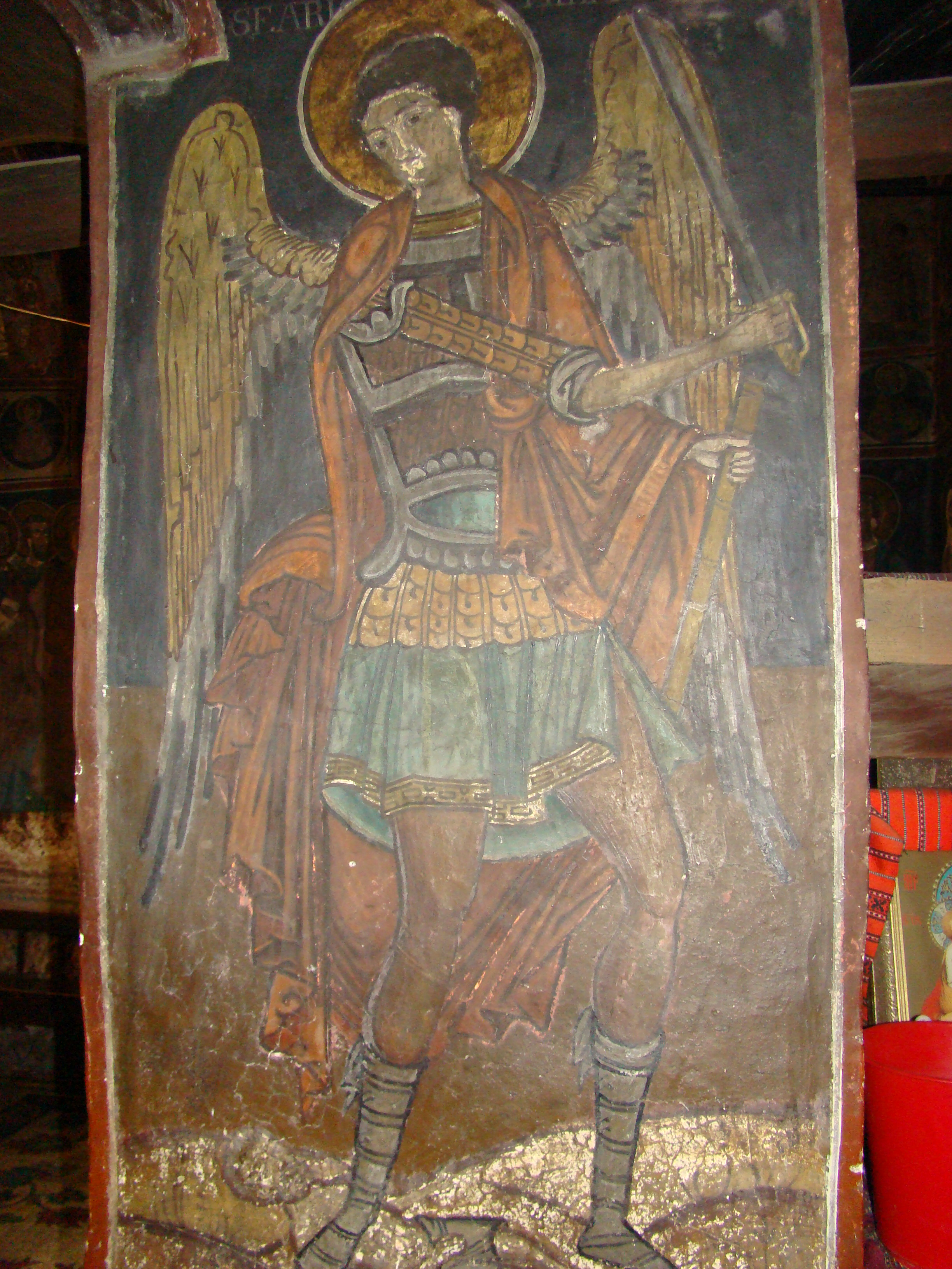 Biserica „Intrarea în Biserică a Maicii Domnului” sat Bărbătești, cătun Mierlești, județul Vâlcea